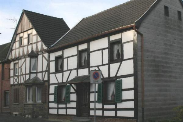 Fachwerkhaus in Wegberg-Rath-Anhoven